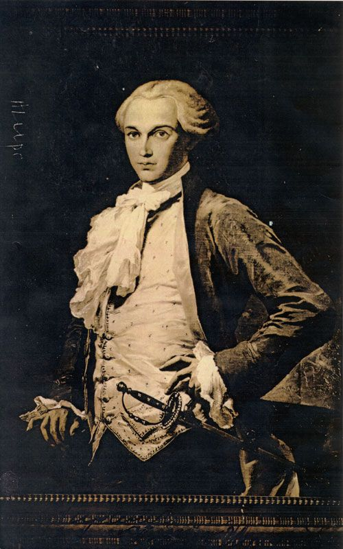 Otto Reinhold Ludwig von Ungern-Sternberg (1744—1811)